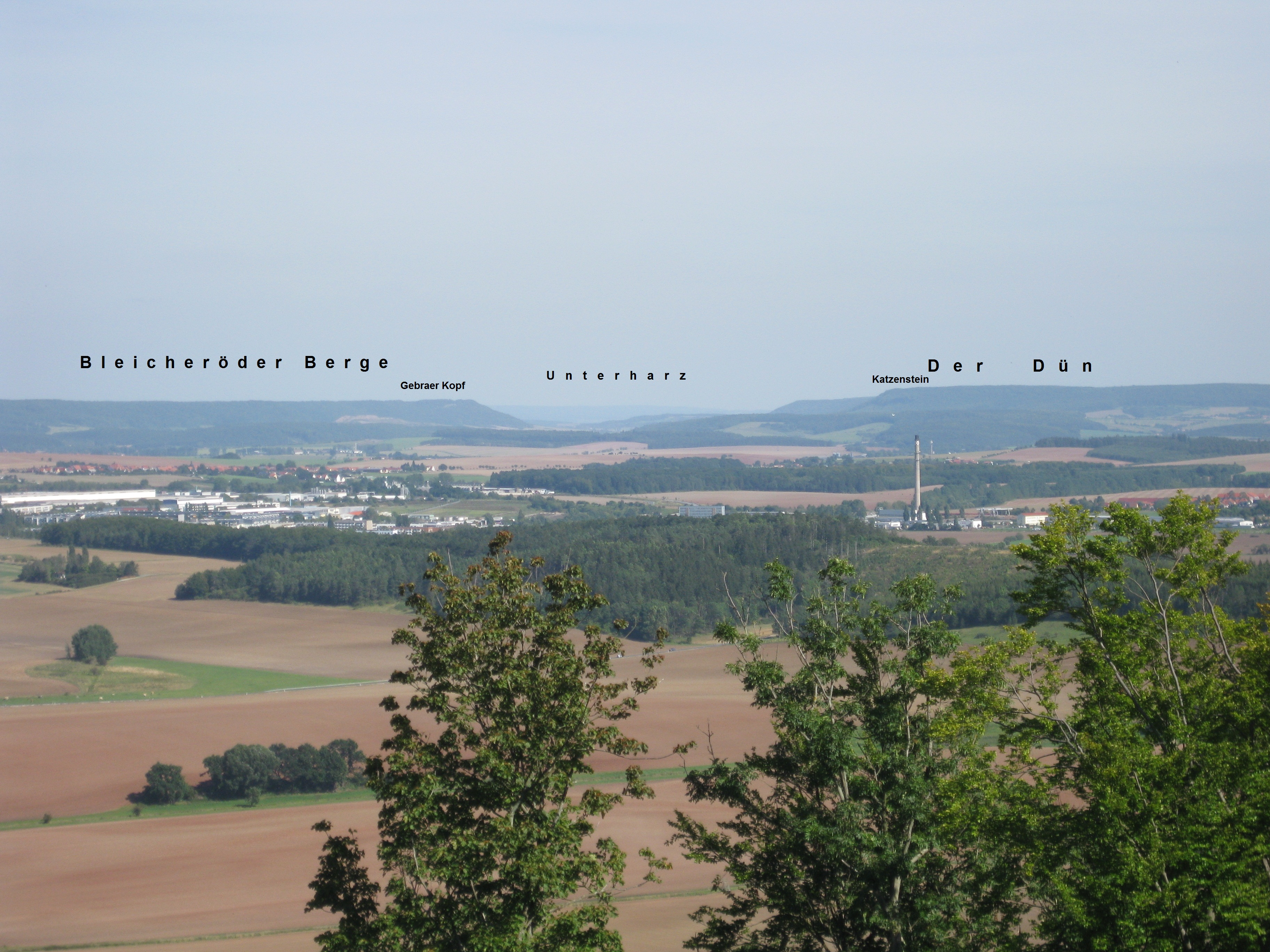 Burg Scharfenstein (Eichsfeld) Aussicht zur Eichsfelder Pforte